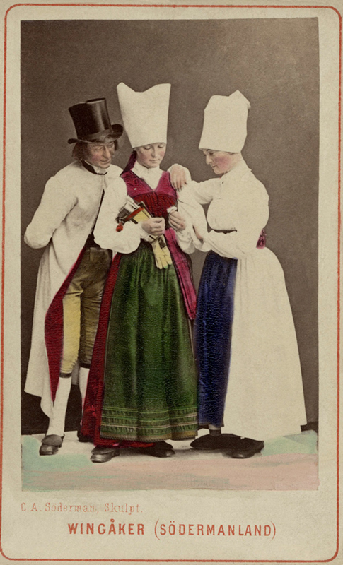 Dräktdockor med huvuden skulpterade av C A Söderman, troligen visade på världsutställningen i Wien 1873. Man och kvinnor i dräkter från Vingåker, Södermanland. Handkolorerat fotografi efter förlaga från målning av J W Wallander.